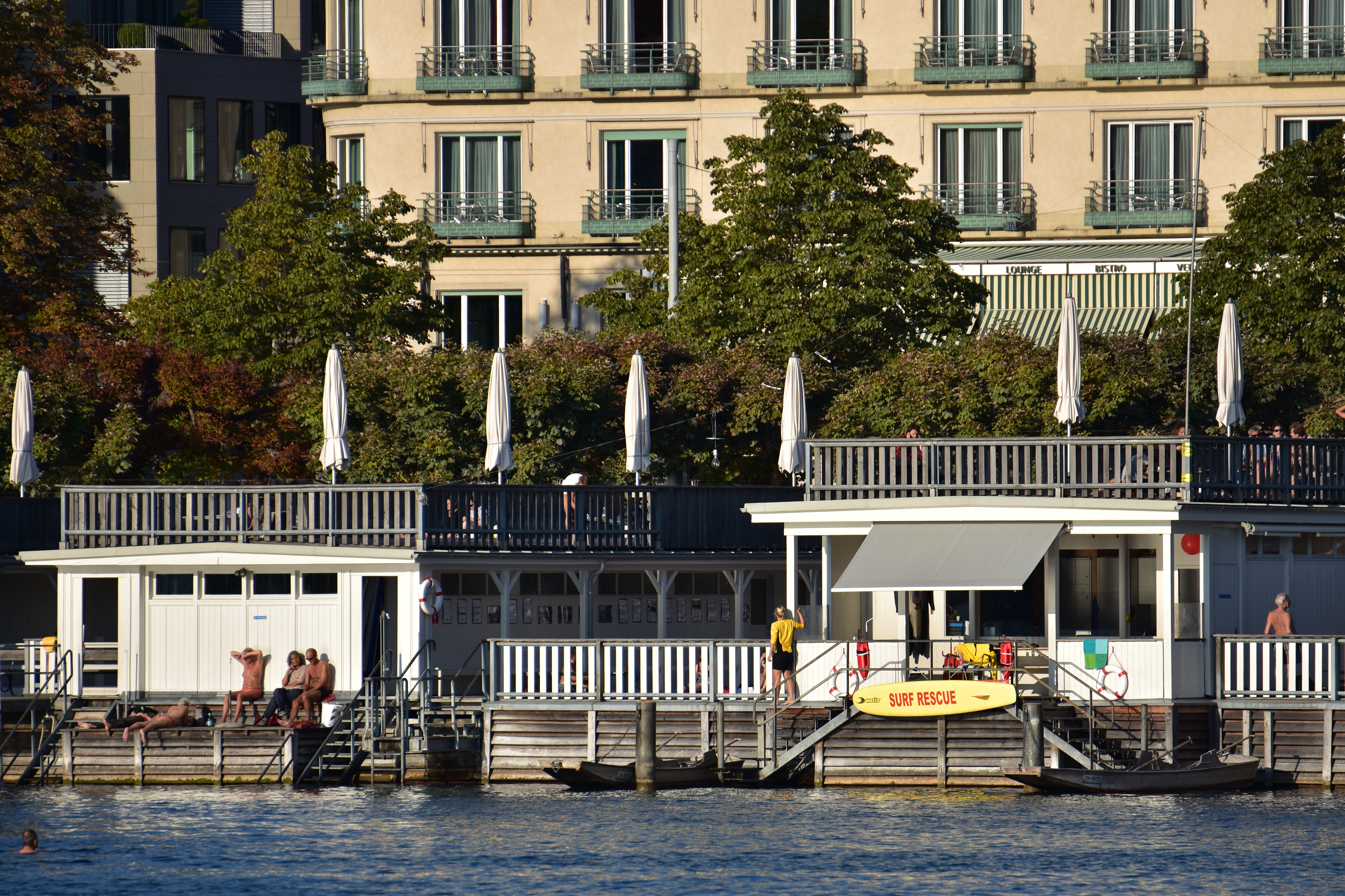 Seebad at Utoquai on Zürichsee lakeshore in Zürich as seen from Zürichsee-Schiffahrtsgesellschaft (ZSG) ship MS Helvetia in Switzerland